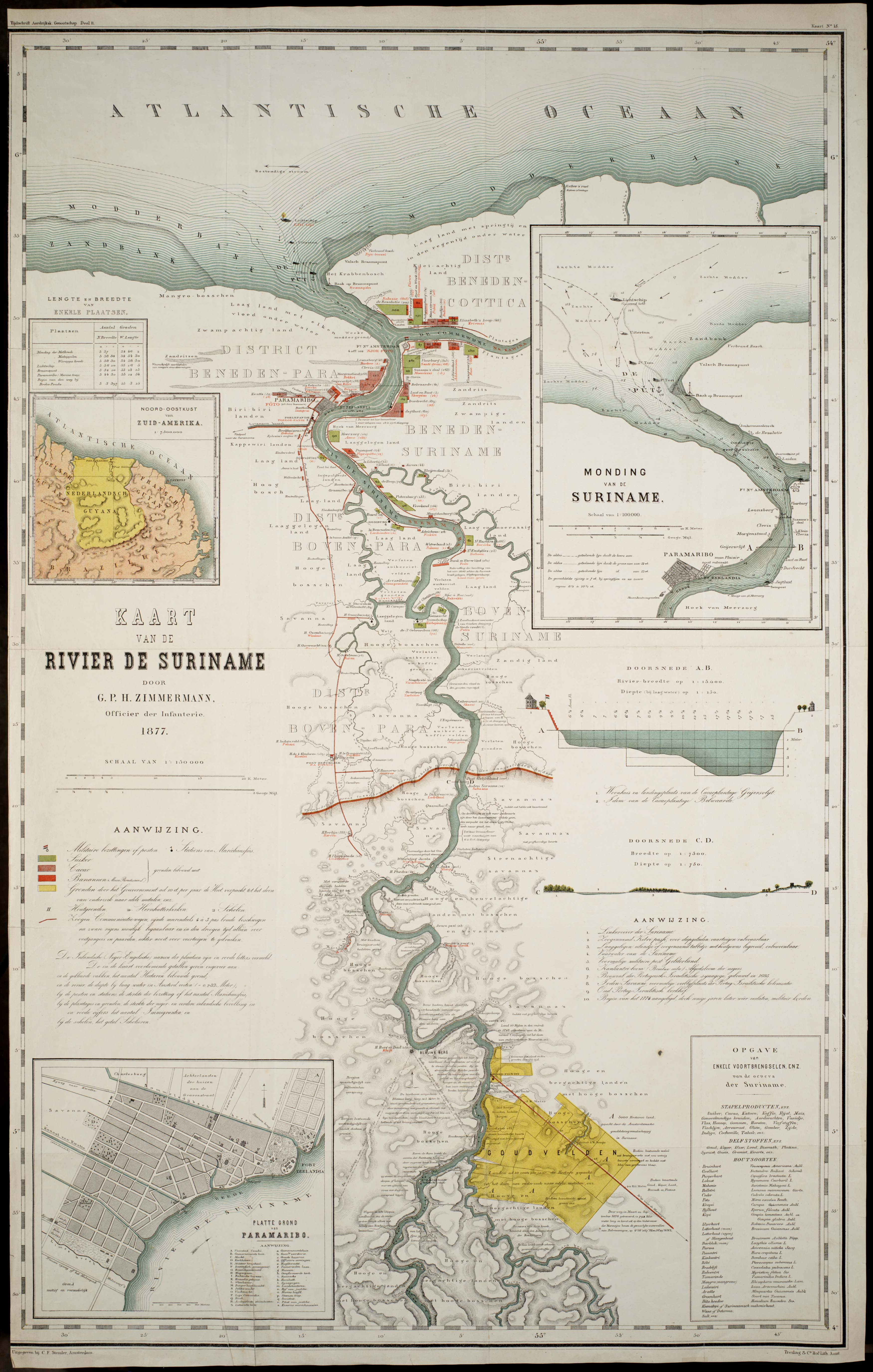 In 1877 liet G.P.H. Zimmermann, officier der Infanterie, deze kaart te Amsterdam drukken. Model hiervoor stond de handschriftkaart, getekend door W.J.F. Vermeulen, die bewaard is gebleven in het Surinaams Museum te Paramaribo.